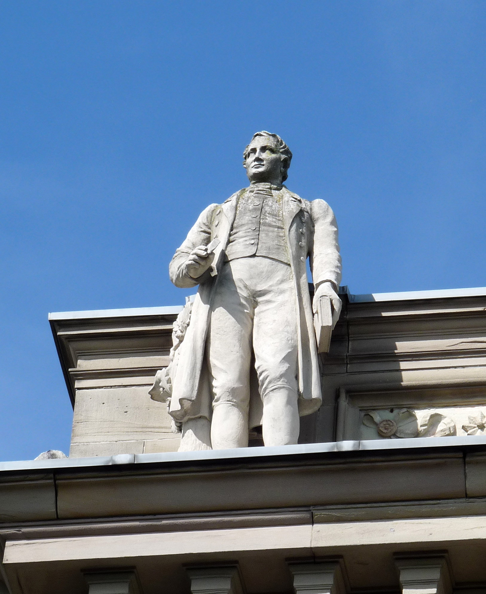 Statue de Karl Friedrich Eichhorn sur la corniche du Palais Universitaire de Strasbourg.